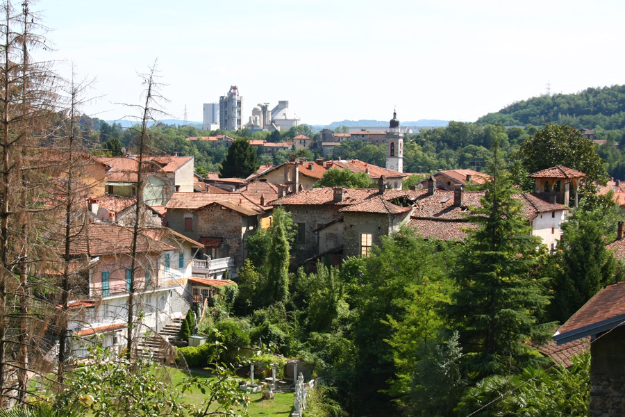 Veduta della nucleo storico di Cittiglio. Sullo sfondo il cementificio